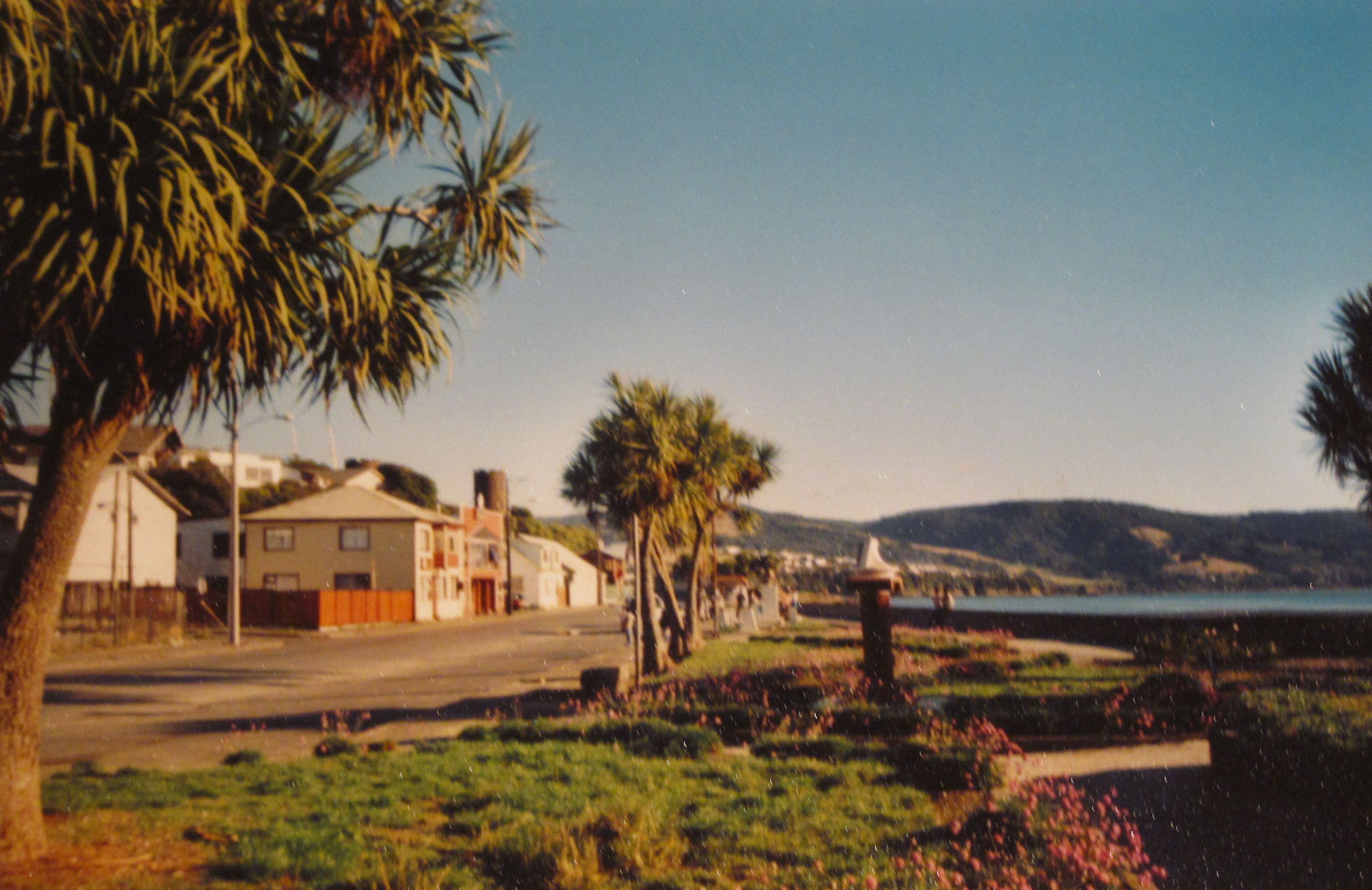 Avenida Salvador Allende, Ancud, Isla de Chiloé, Chile